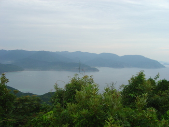 都井岬から宮崎方向